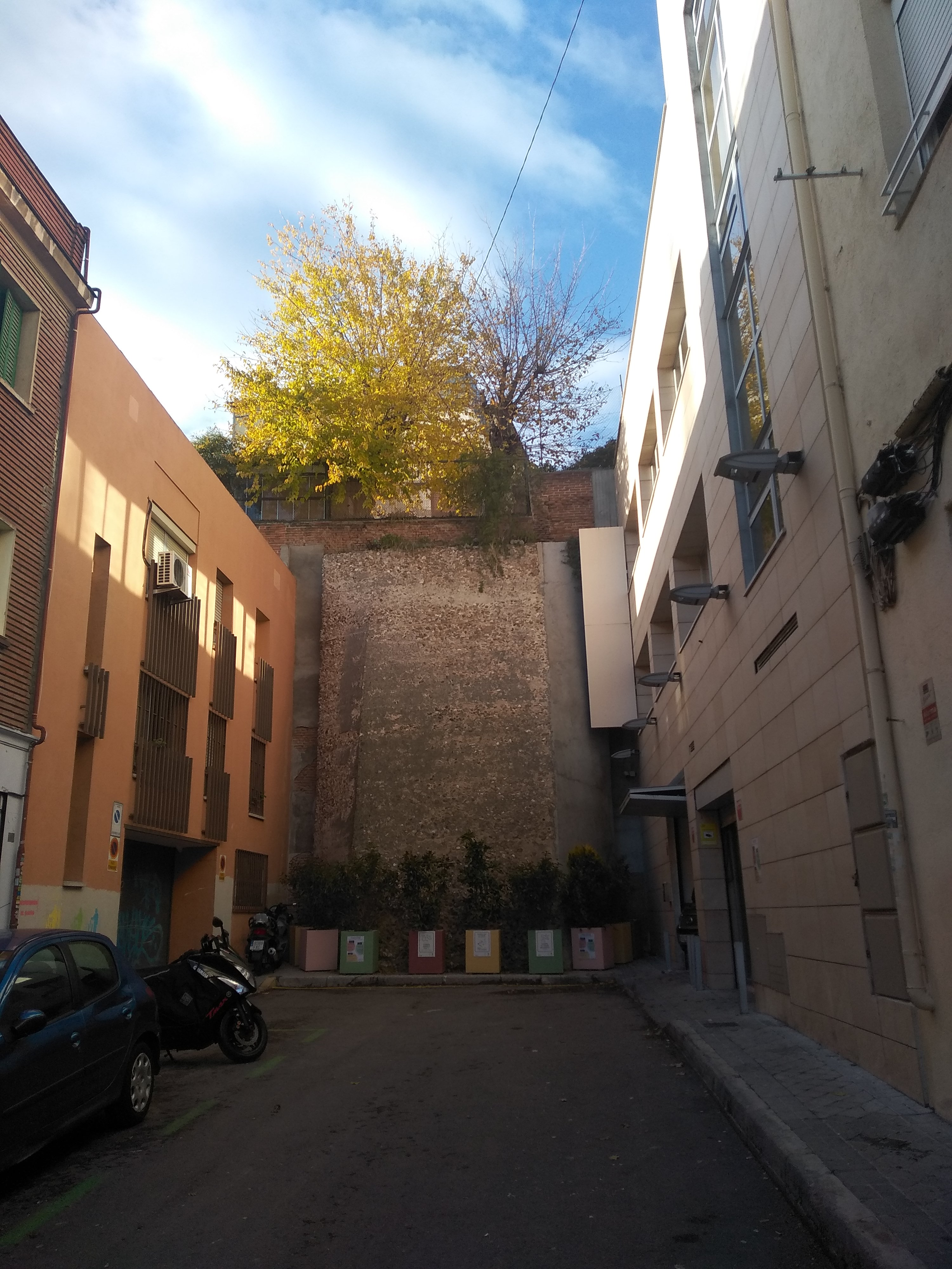 Muro de la calle Paravicino tras añadir plantas por parte de Ayuntamiento y vecinos